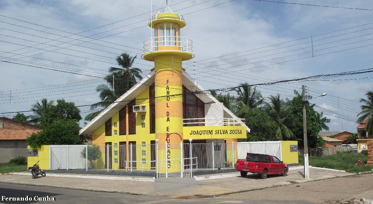 Biblioteca pública em Alto alegre do Pindaré, Maranhão Brasil.